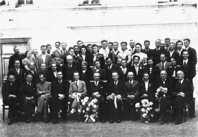 Maturzyści, nauczyciele i Komitet Rodzicielski Gimnazjum Białoruskiego w Wilnie, 1941-1944. Czwarty od prawej siedzi przewodniczący Komitetu Rodzicielskiego Hassan Konopacki.